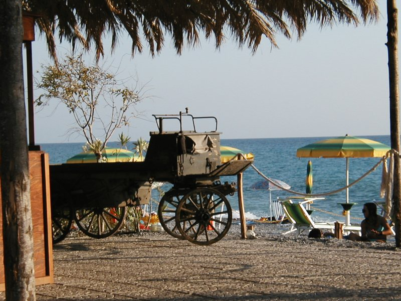 Spiaggia del comune di Paola (foto di Luigino C.)